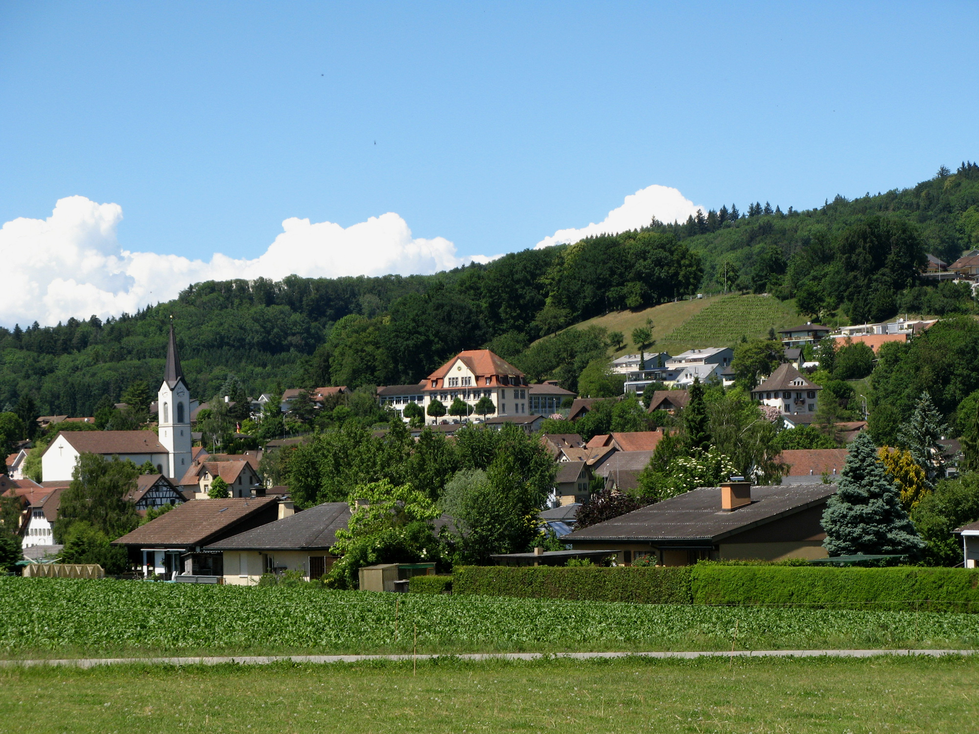 Ansicht von Dottikon